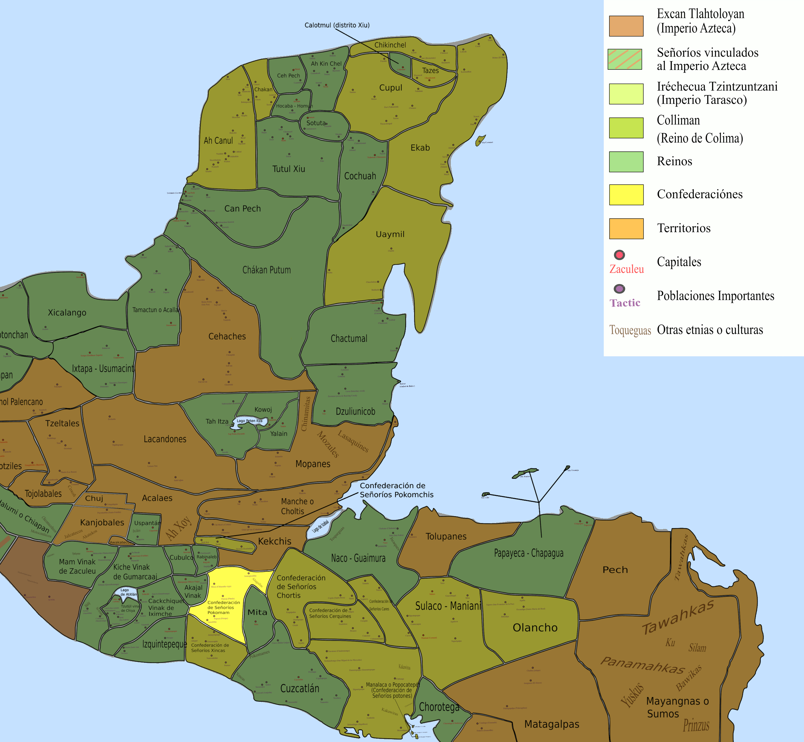 Mapa de la Confederación Paqomam, allá por el año 1520 de la encarnación de Jesucristo nuestro señor.